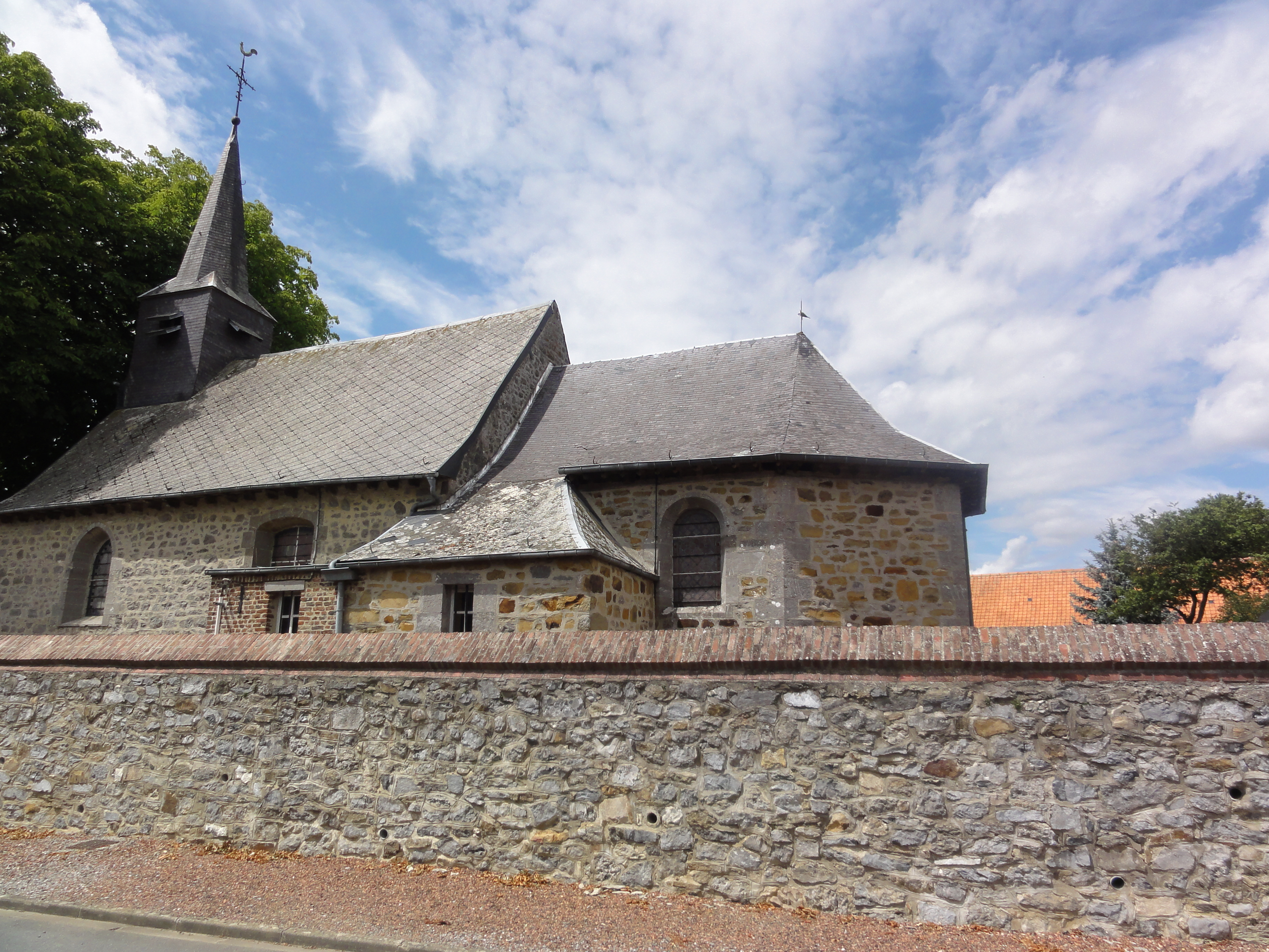 Wattignies-la-Victoire (Nord, Fr) église, coté sud